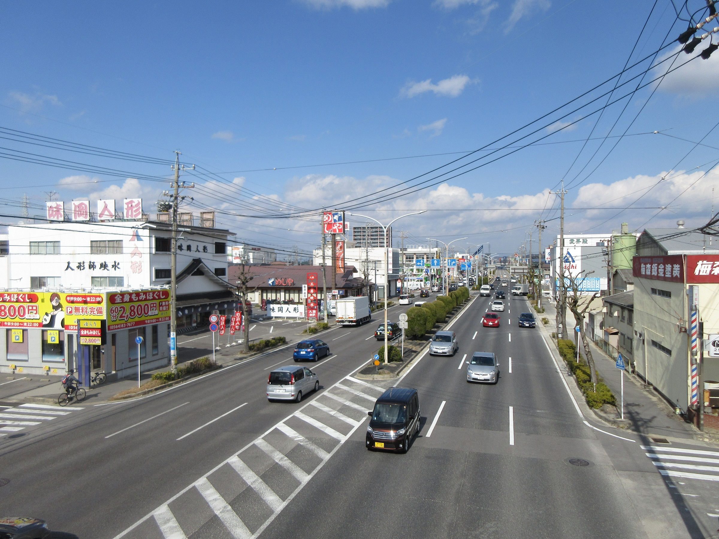 国道248号（岡崎市葵町）